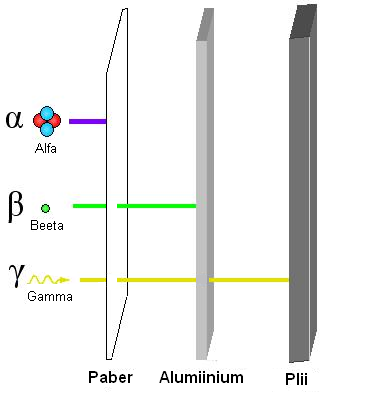 Radiatsiooni läbivus